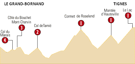 Profile of stage 8 of the 2007 Tour de France - 8e etappe v/d Ronde van Frankrijk 2007